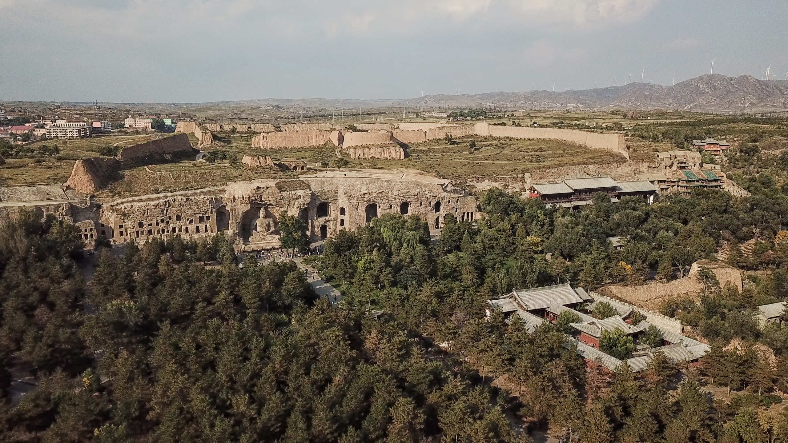 中文（中国大陆）: 中国山西云冈石窟，北魏时期皇家佛教造像集中地